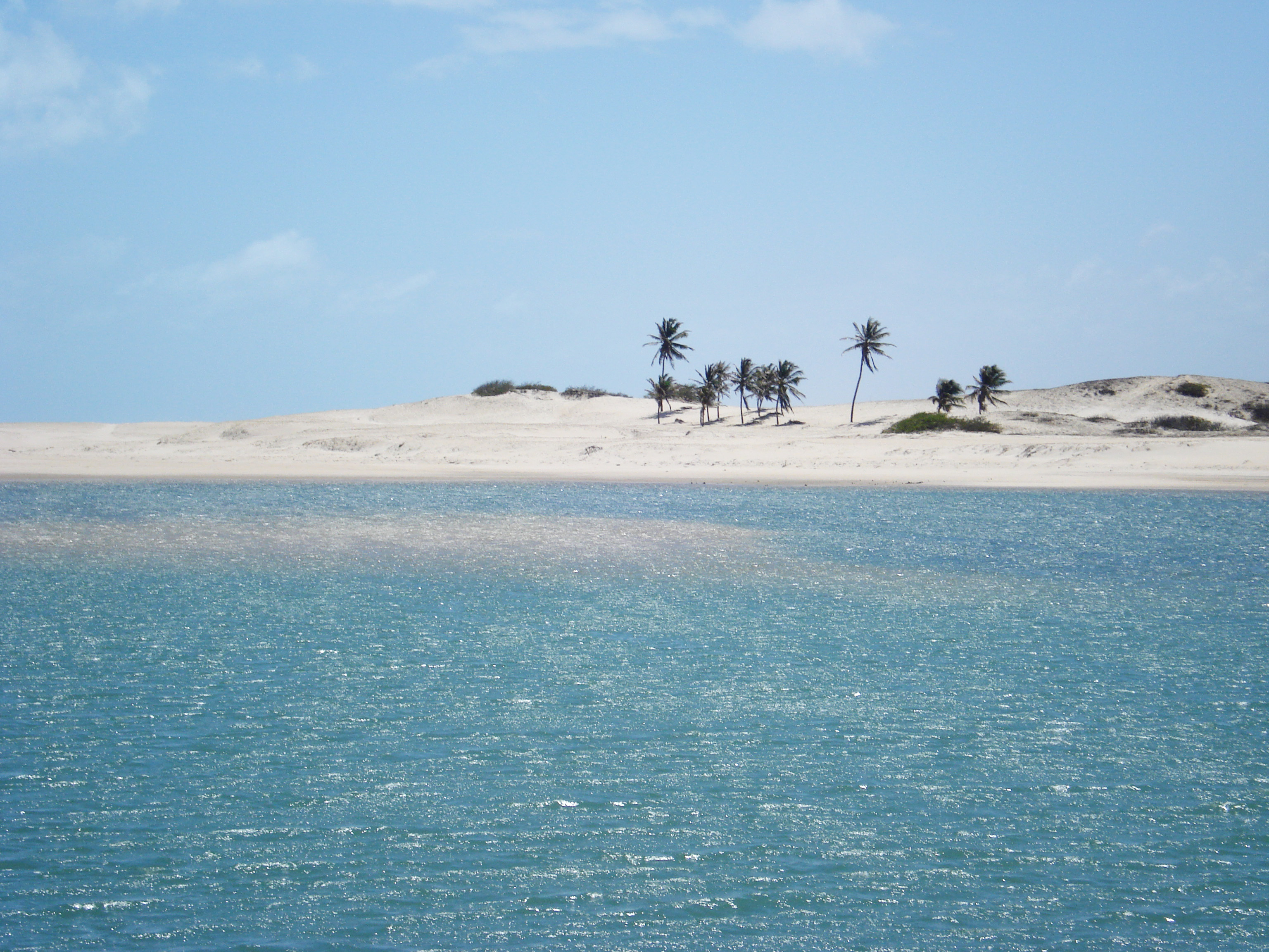 Praia de Águas Belas, em Cascavel (Ceará)